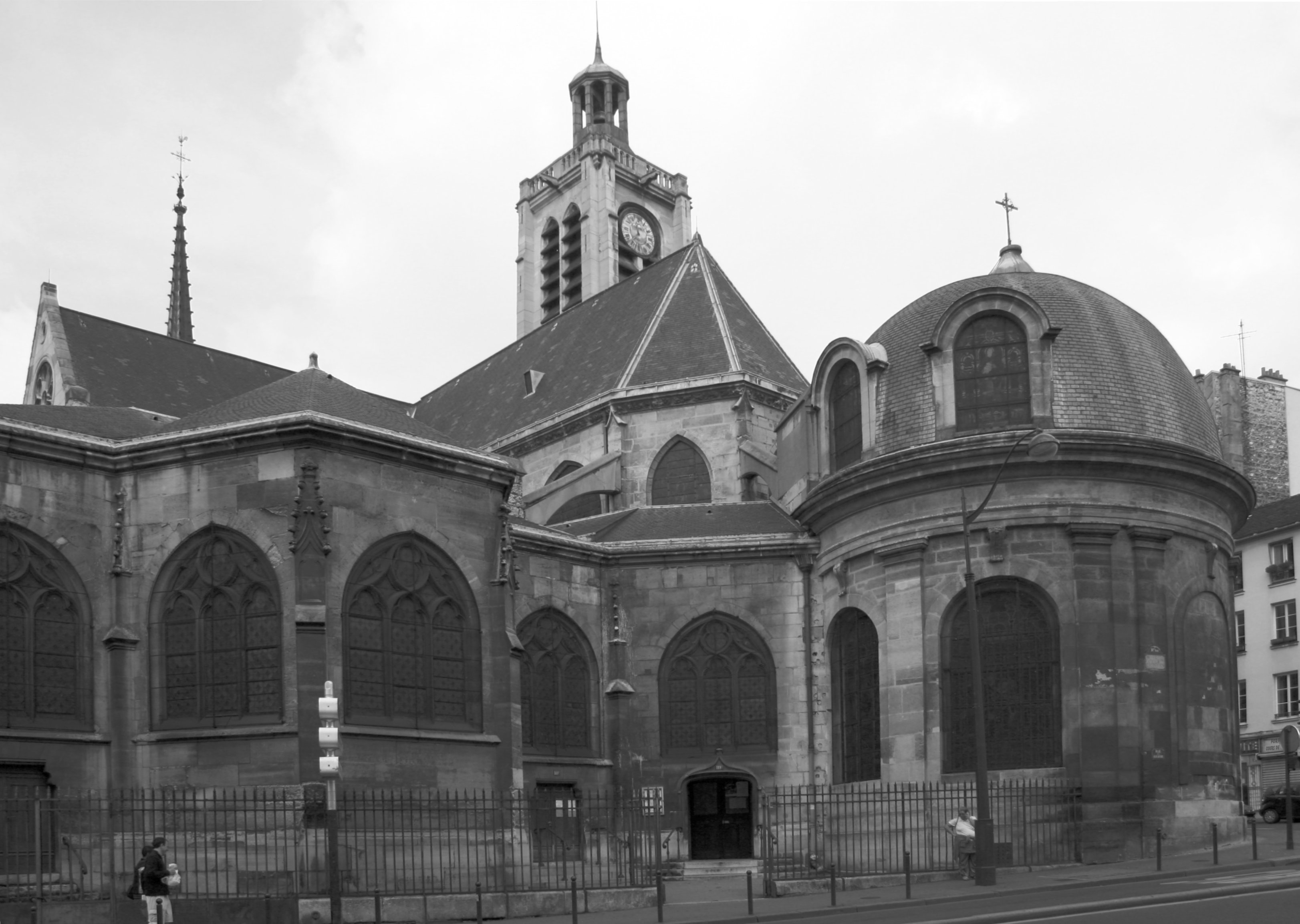 Photo du chevêt de l'église Saint-Laurent (Paris)